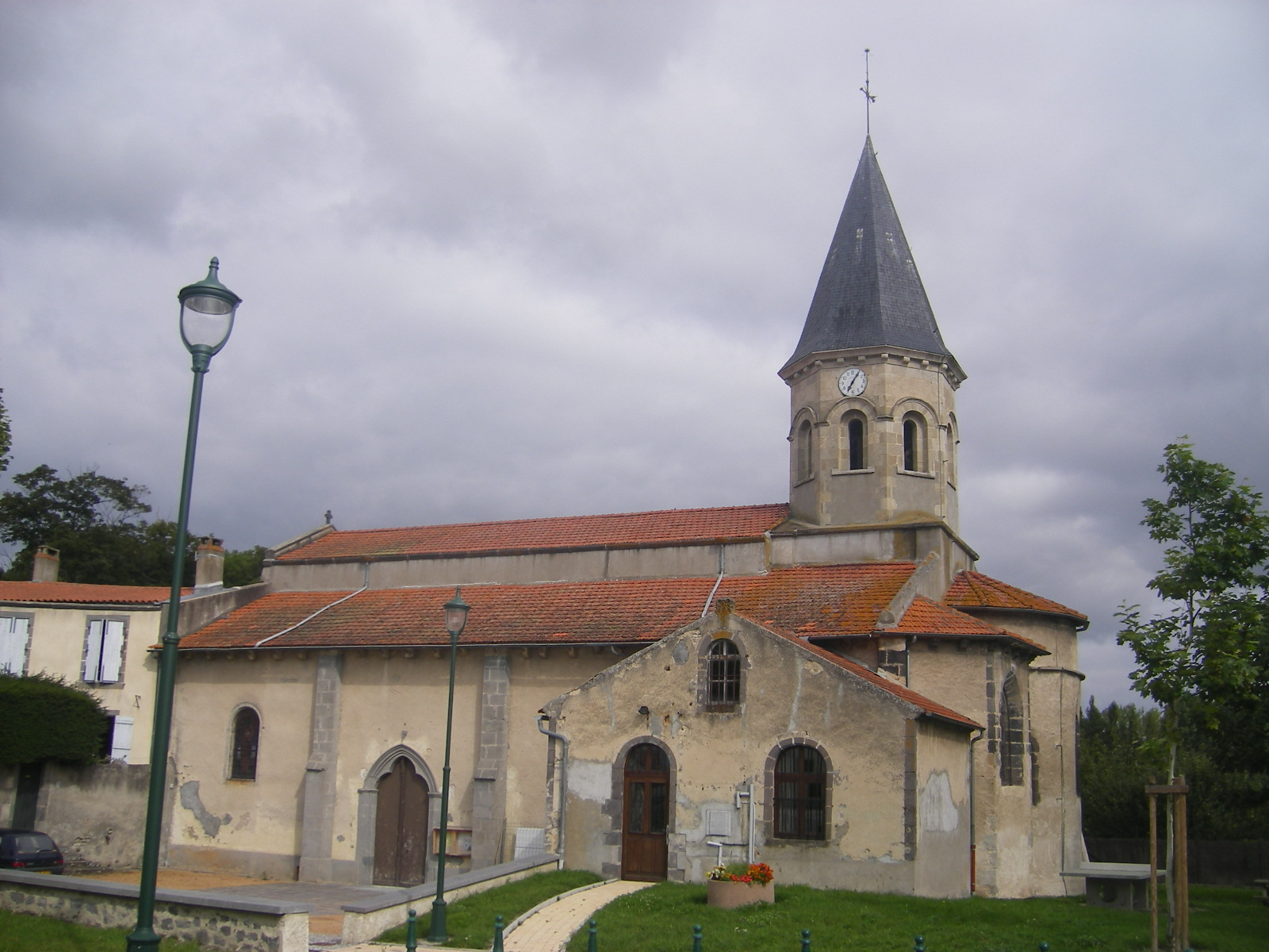 Varennes-sur-Morgue